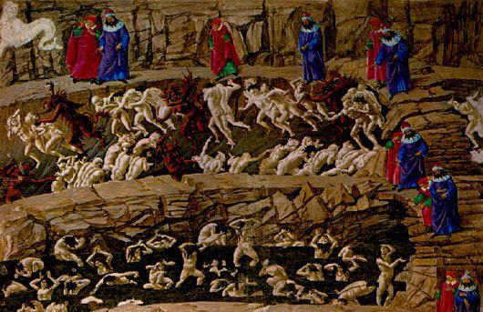 Inf._18_Sandro_Botticelli,_alchimisti